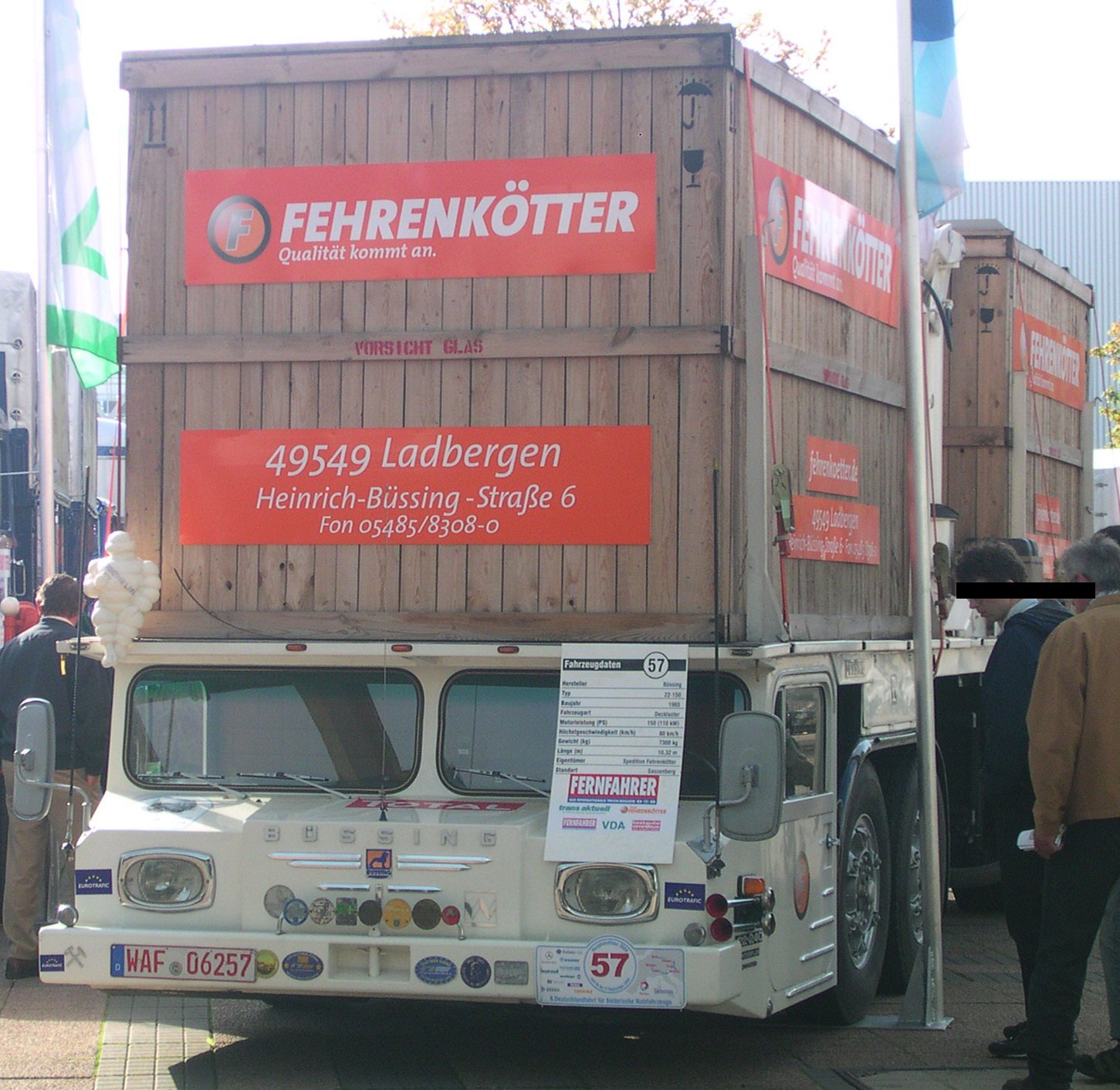 Nutzfahrzeug-IAA 2004 in Hannover, Büssing 22-150 Decklaster, Baujahr 1965, 110 kW (150 PS), vmax 80 km/h, Länge 10,32 m, Gewicht 7300 kg.